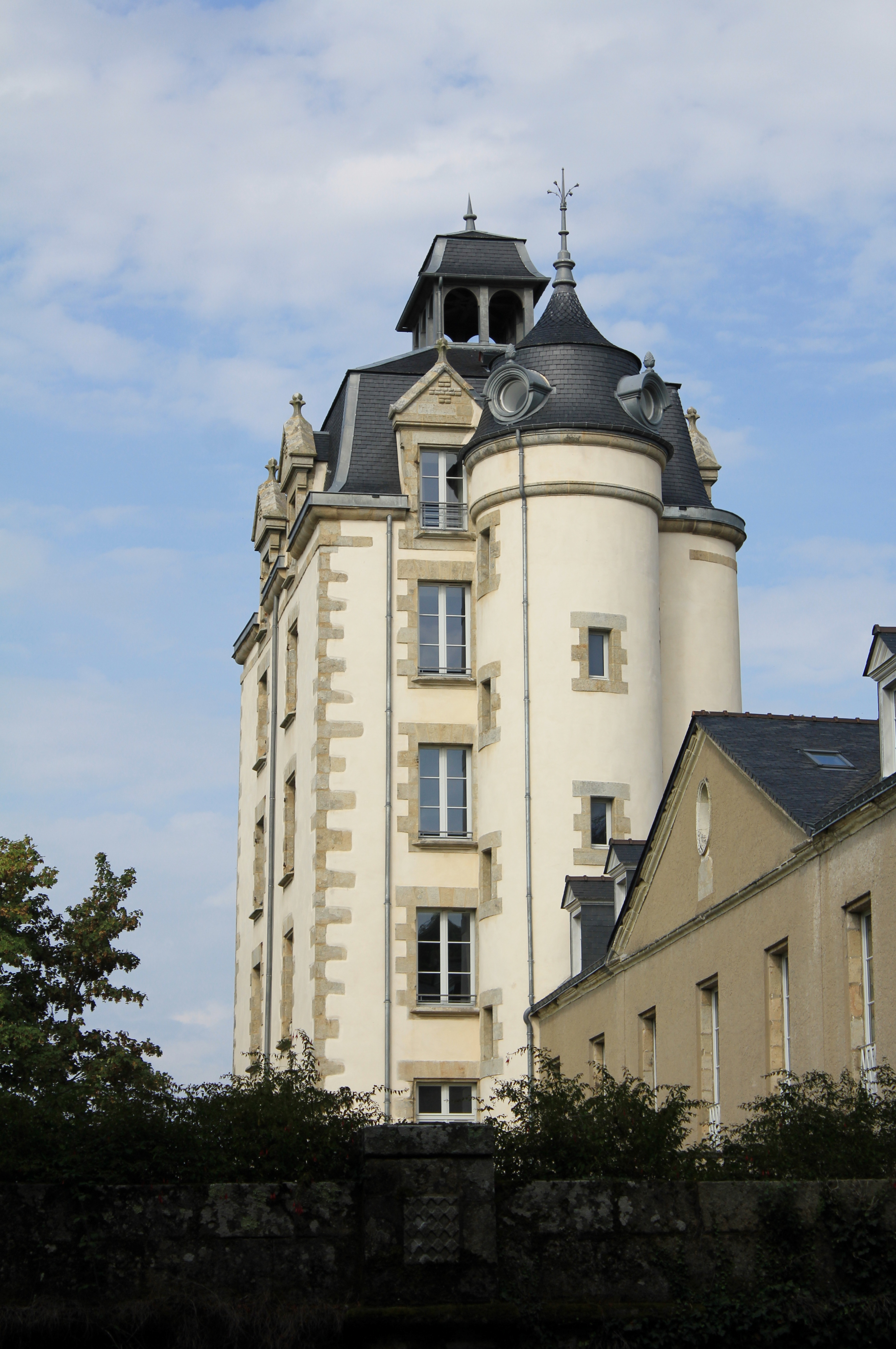 Château de Kéravéon : tour du XIXé depuis le sud .